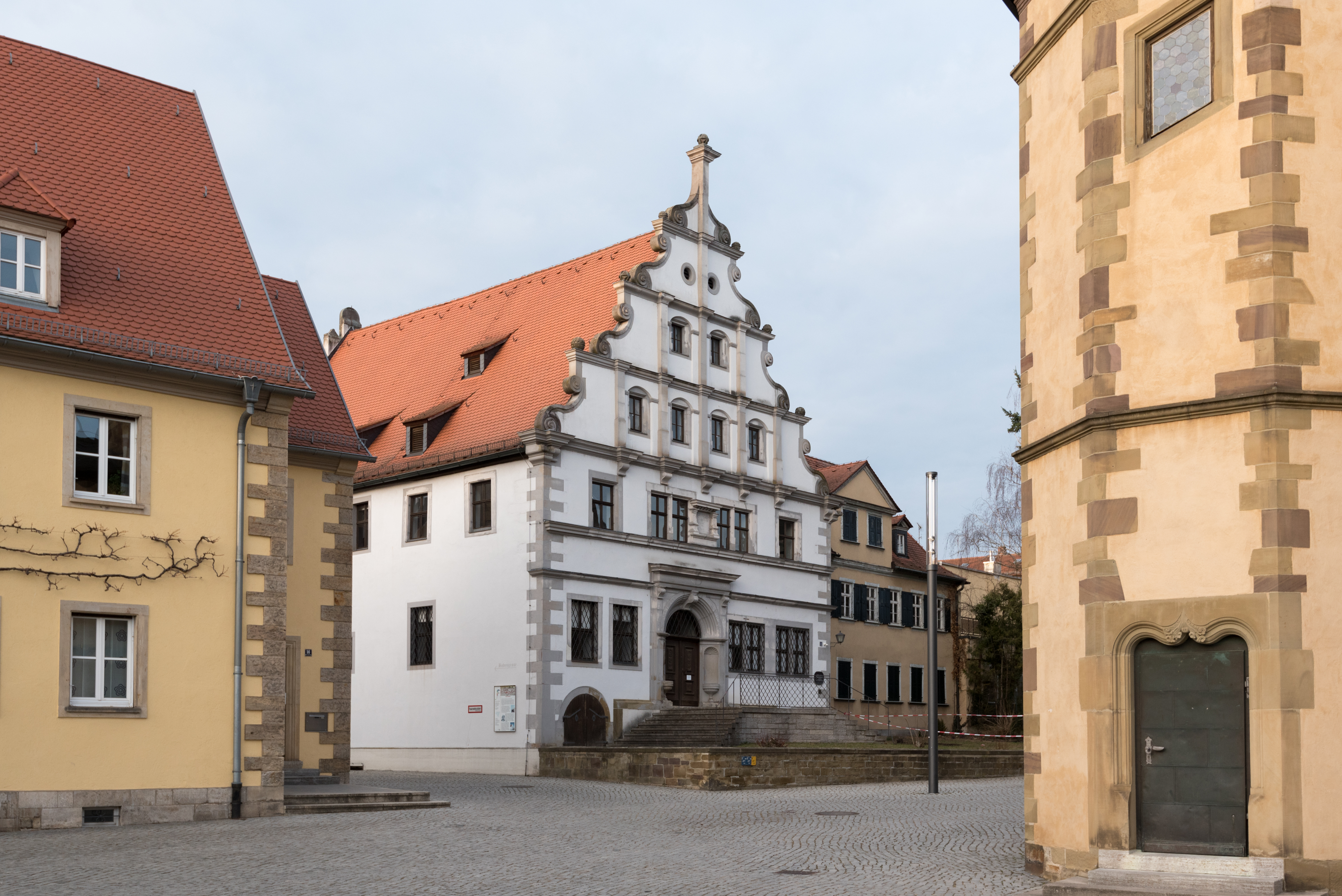 Schweinfurt, Martin-Lutherplatz, Altes Gymnasium